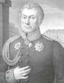 Ludwig Matthias Nathanael Gottlieb von Brauchitsch (1757-1827), Generalleutnant (Lieutenant General)